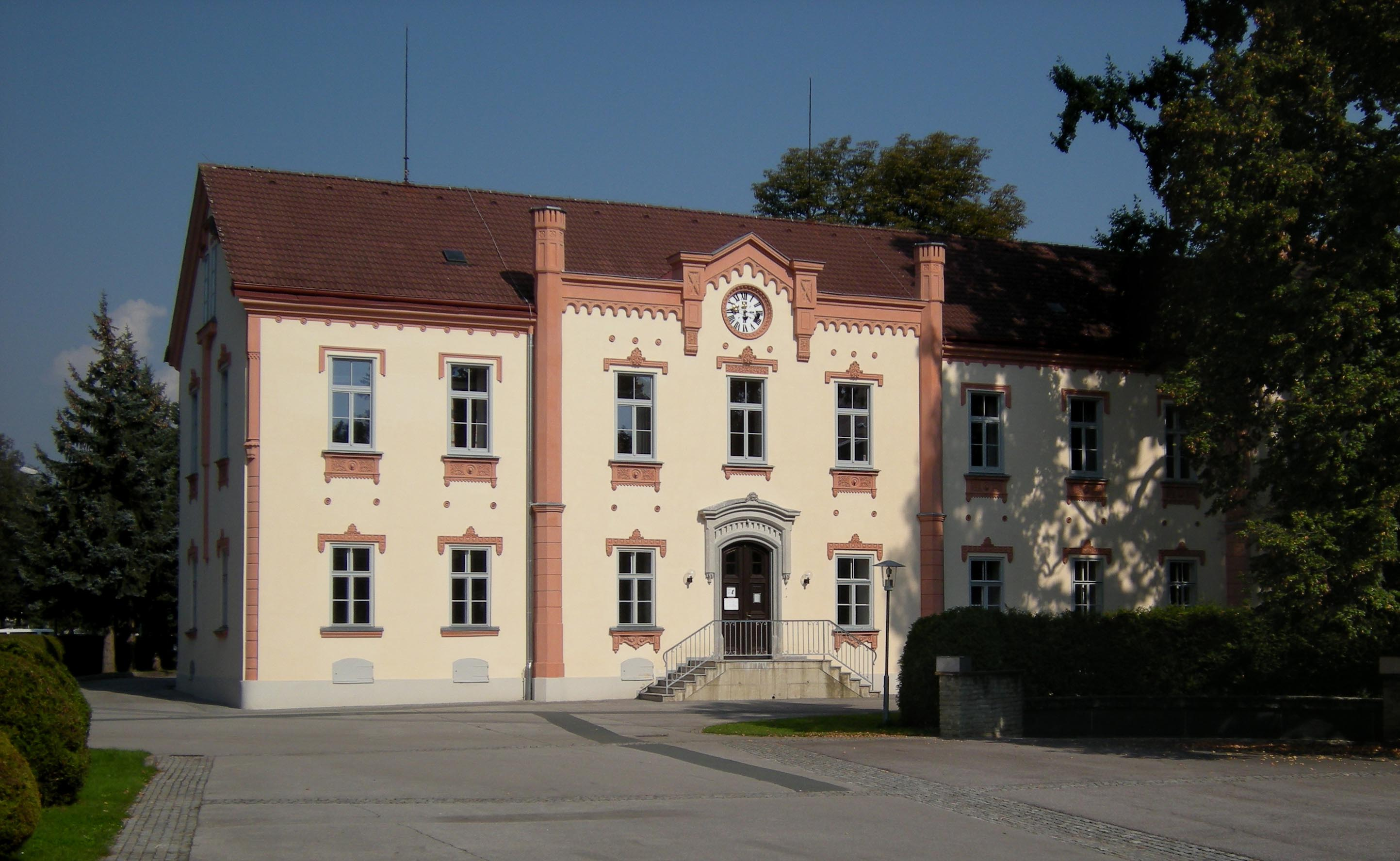 BG-BORG_HIB_Graz_Liebenau